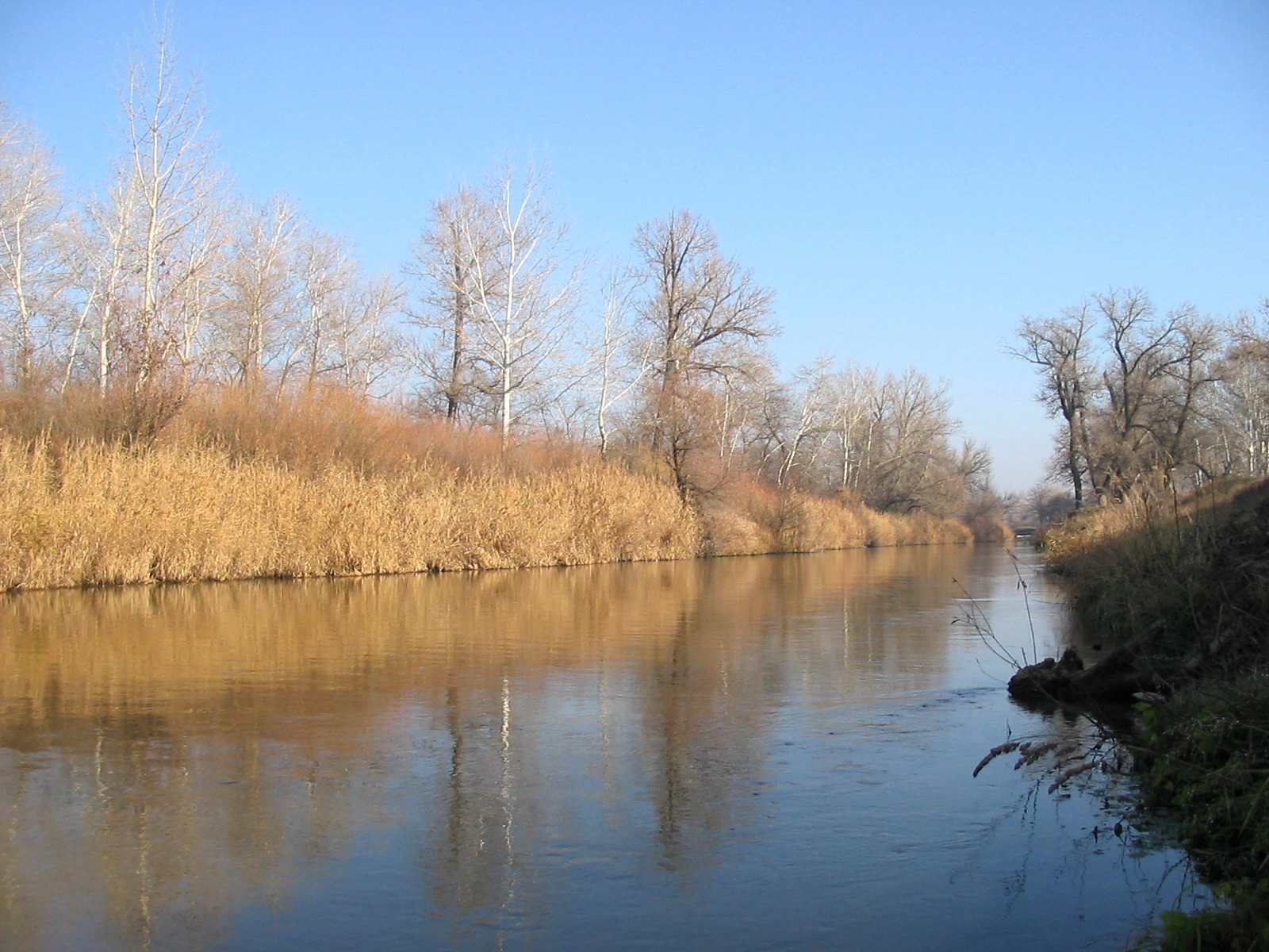 Осенняя гладьФото реки Боровая, осенью